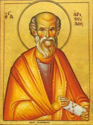 ícone bizantino representando Santo Aristides de Atenas